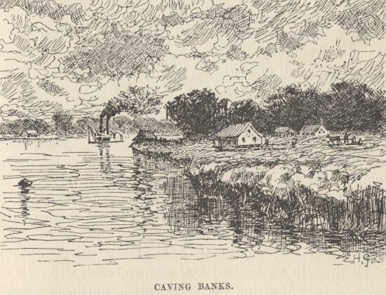 Le fleuve ronge les berges qui se métamorphosent sans cesse.